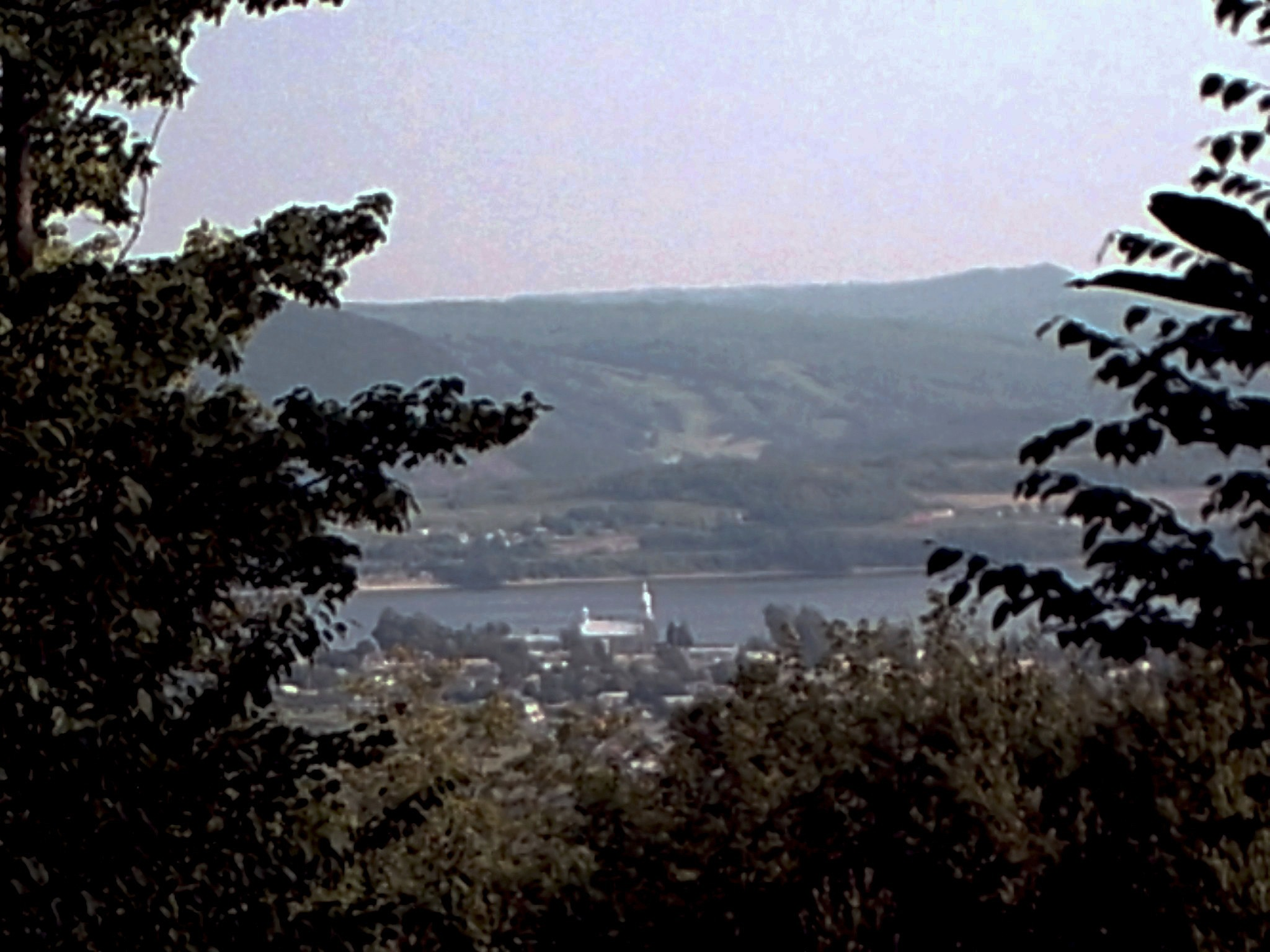 Pointe-à-la-Croix, ou Cross Point (anglais), municipalité de la rive sud de la Gaspésie, Québec, Canada.